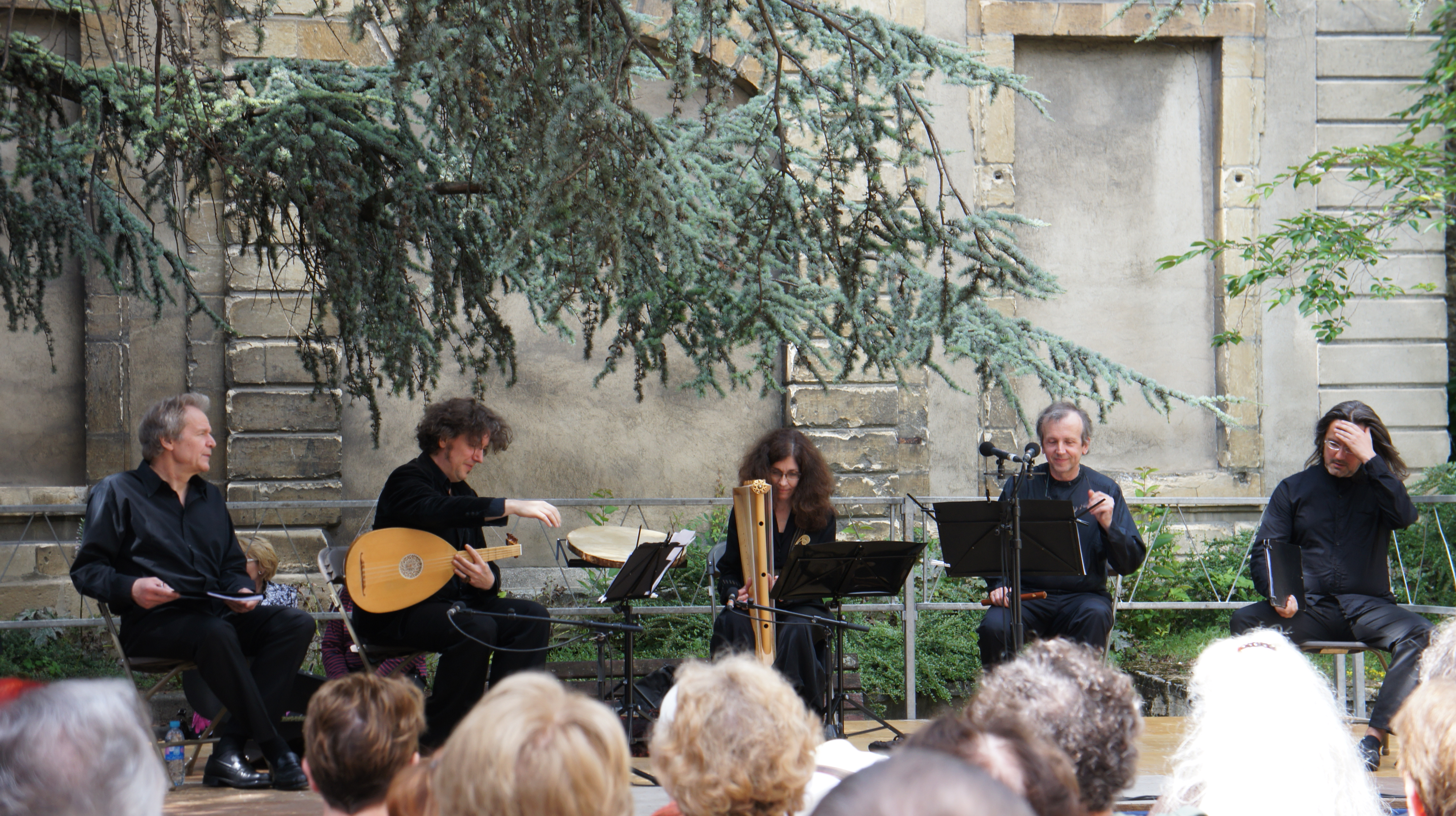 lors des Flâneries musicales 2013, Alla Francesca à l'hôtel le Vergeur .